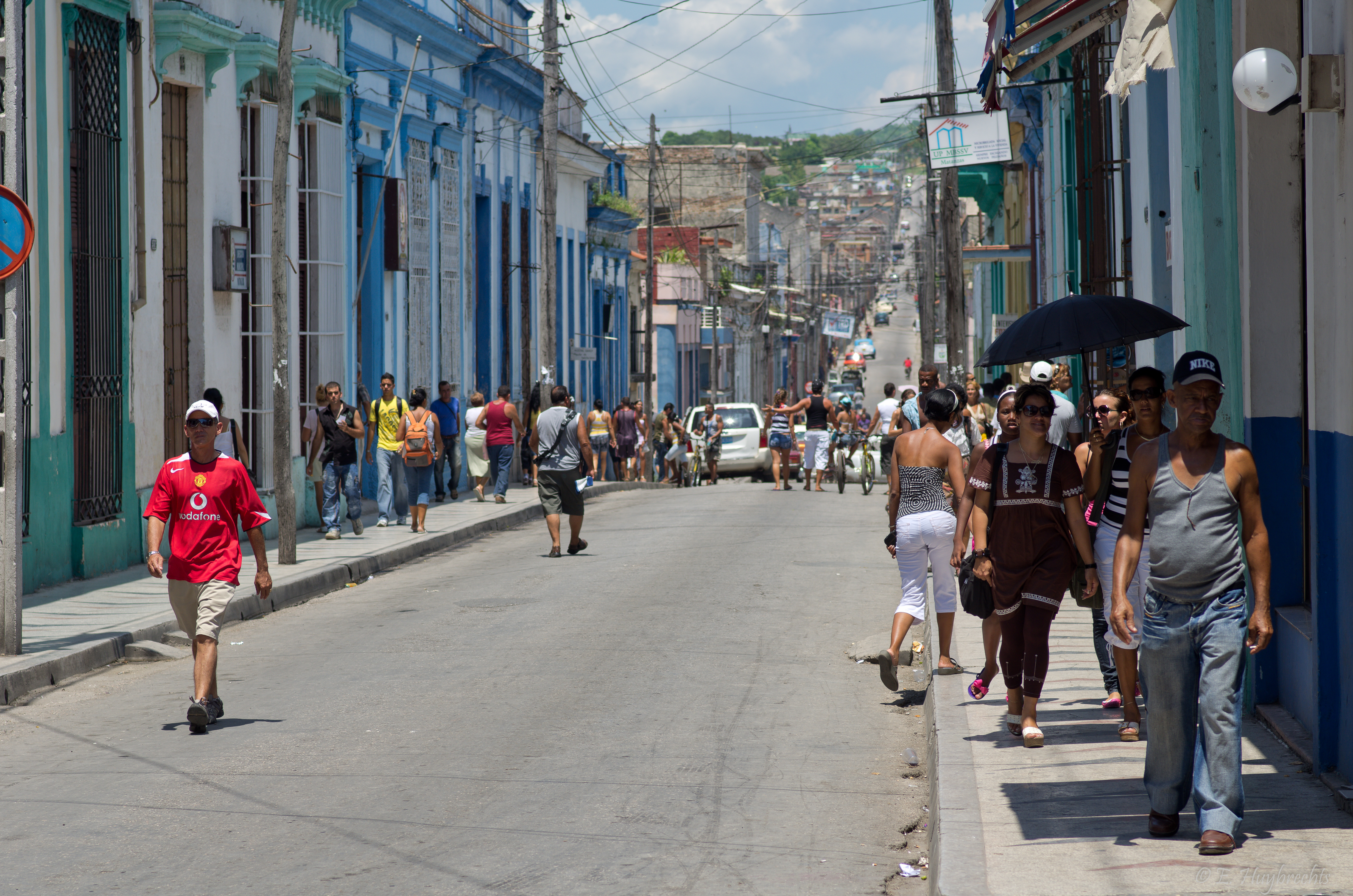 21 juillet 2011 (K5_02567)